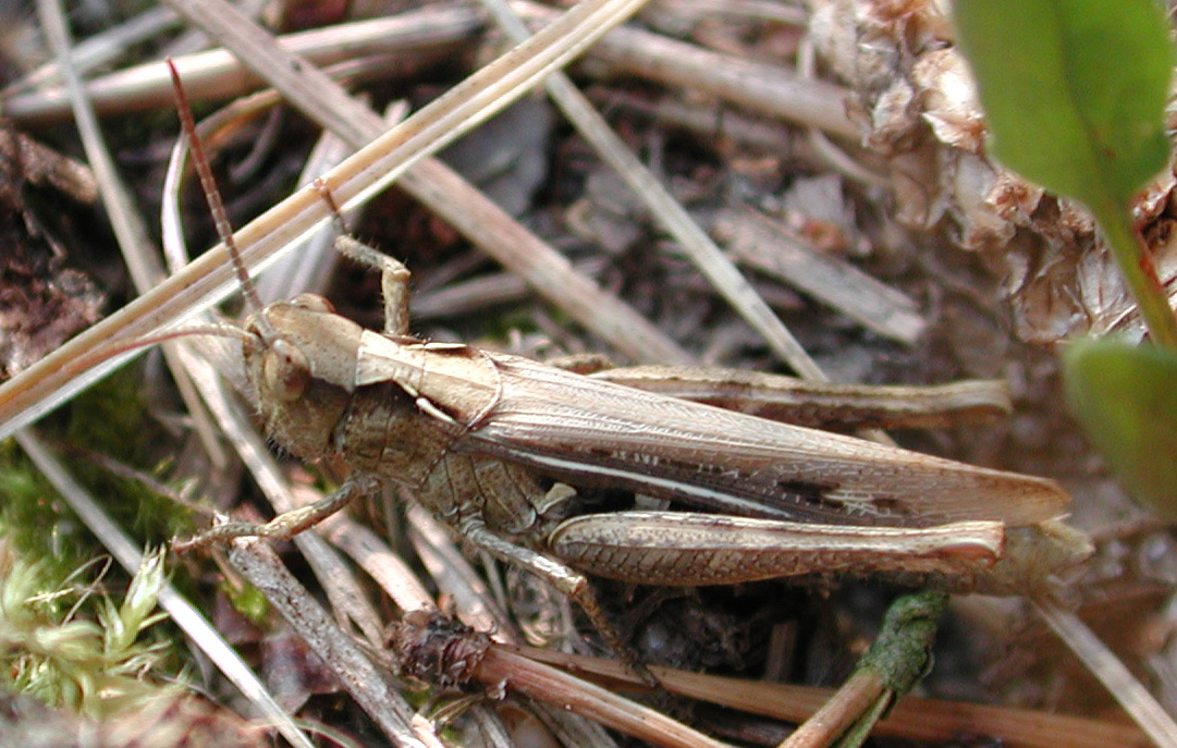 Chorthippus mollis, f., Verkannter Grashüpfer, Weibchen, NSG Borghorster Dünen, Elbetal bei Hamburg, Germany